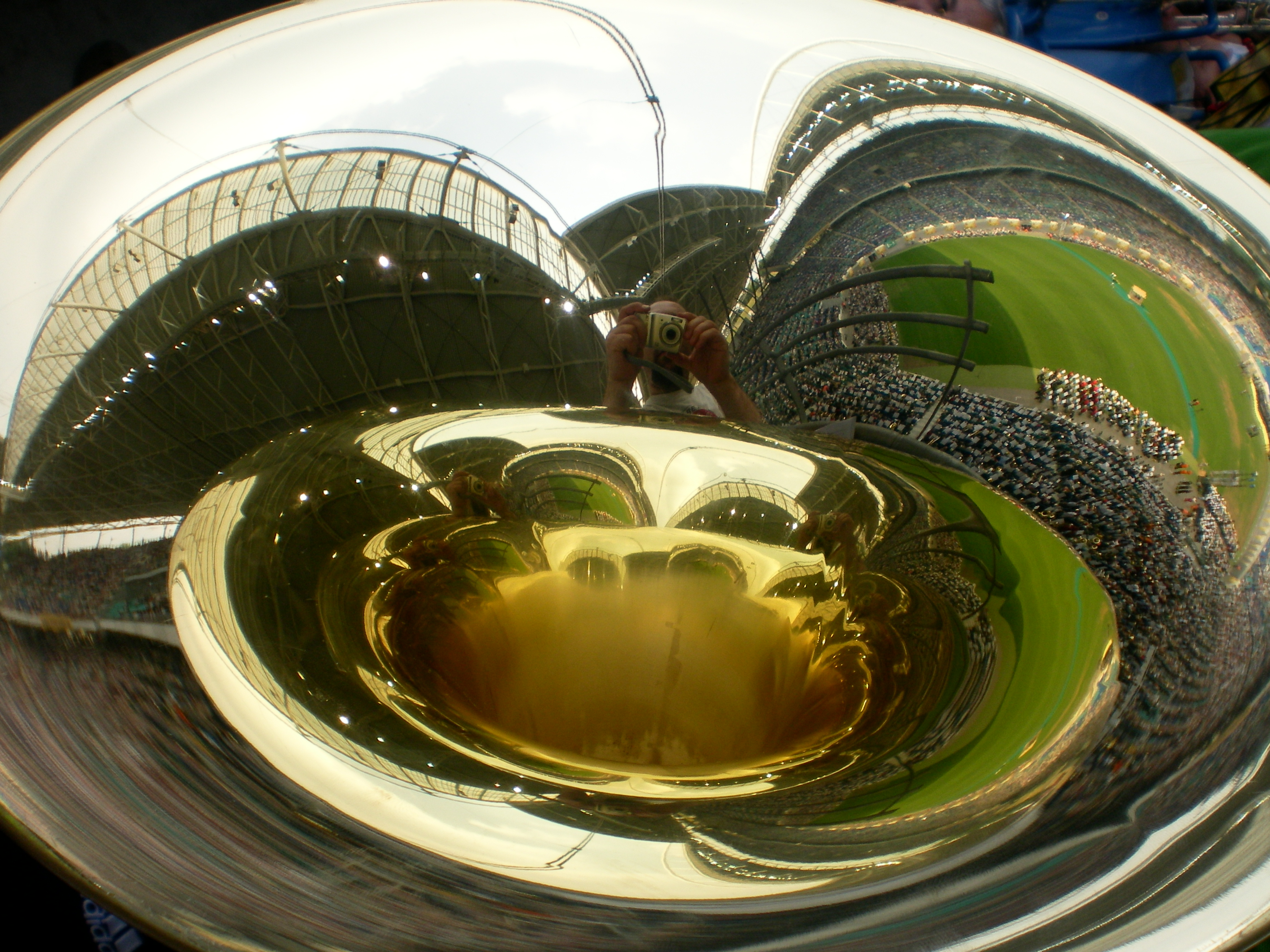 Bild des Abschlußgottesdienstes des Deutschen Posaunentages 2008 in Leipzig